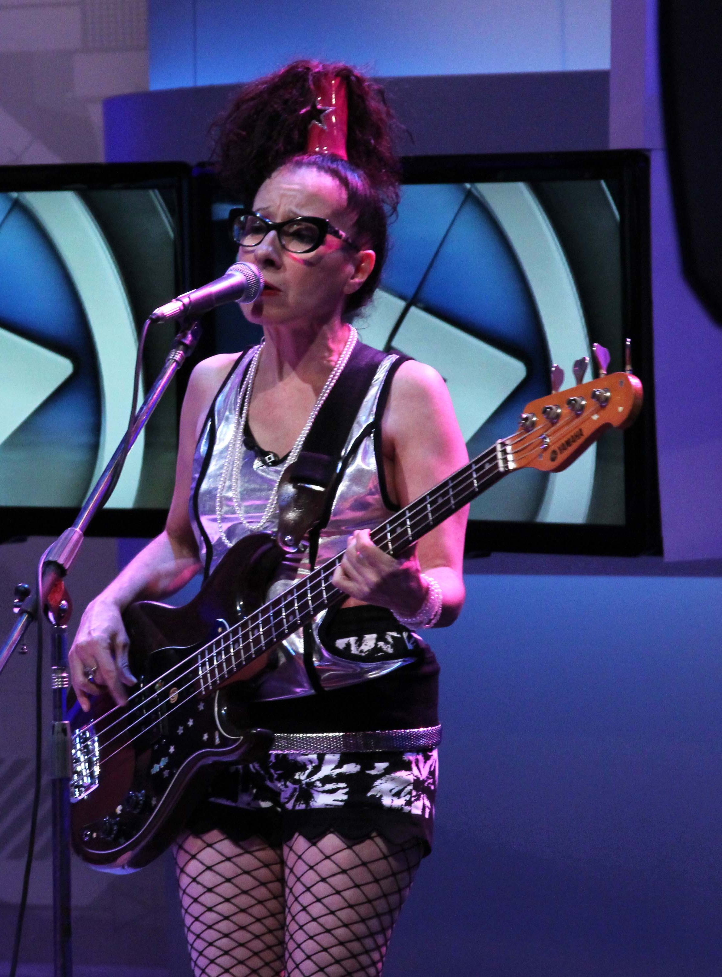 Viuda e Hijas de Roque Enroll invitadas de Jueves de música en Visión Siete Resumen.30-10-2014.